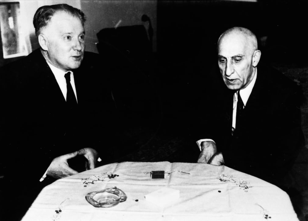 سفیر جدید روسیه (آناتولی لاورِنتیو) جایگزین ایوان سادچیکوو شد. او در 6 و 11 مرداد 1332 با مصدق دیدار کرد. این آخرین نگاره از مصدق پیش از حوادث مرداد آن سال است.